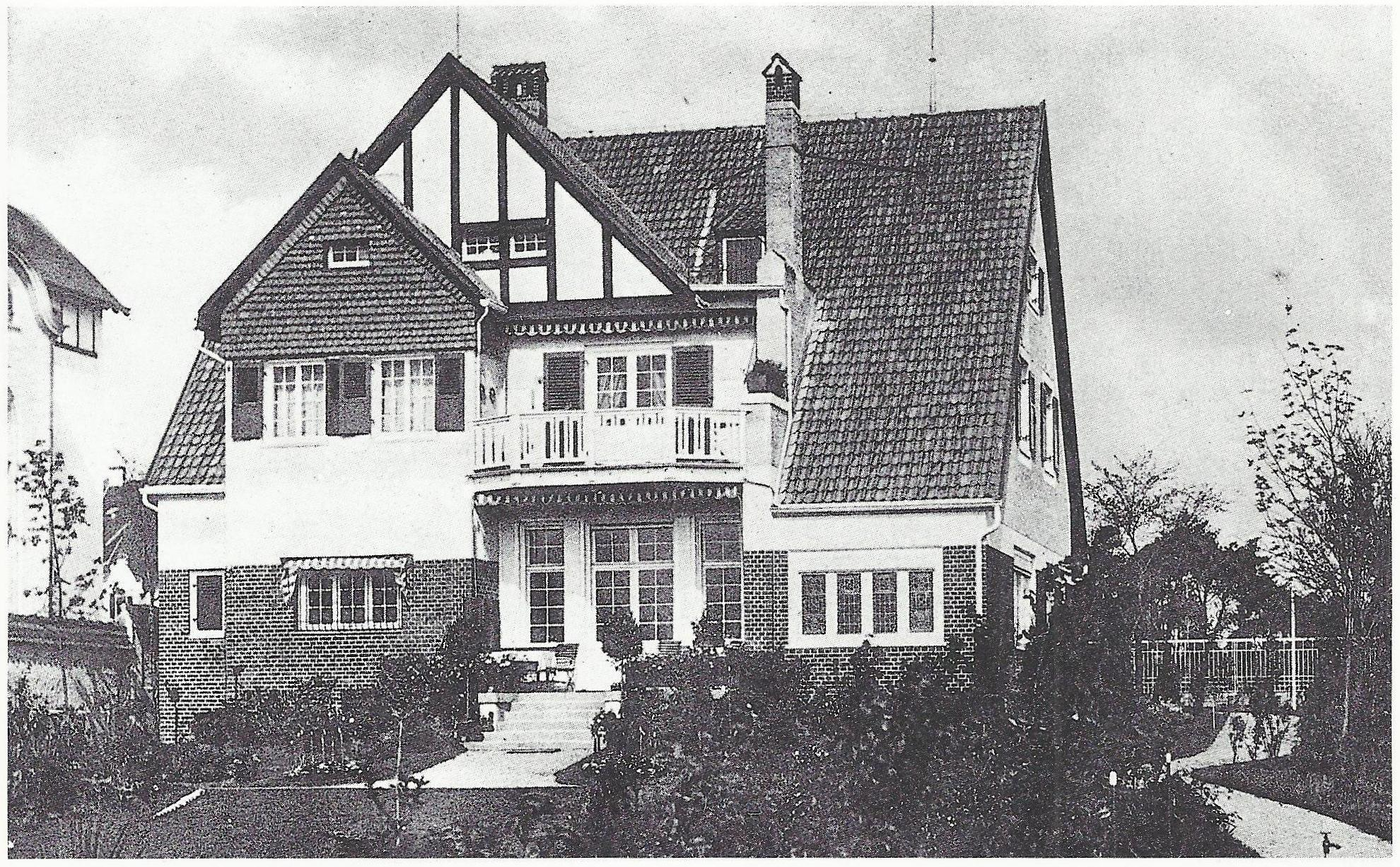 Villa Litzmann (im Zweiten Weltkrieg zerstört), Lindenallee 23, Köln-Marienburg: Gartenansicht